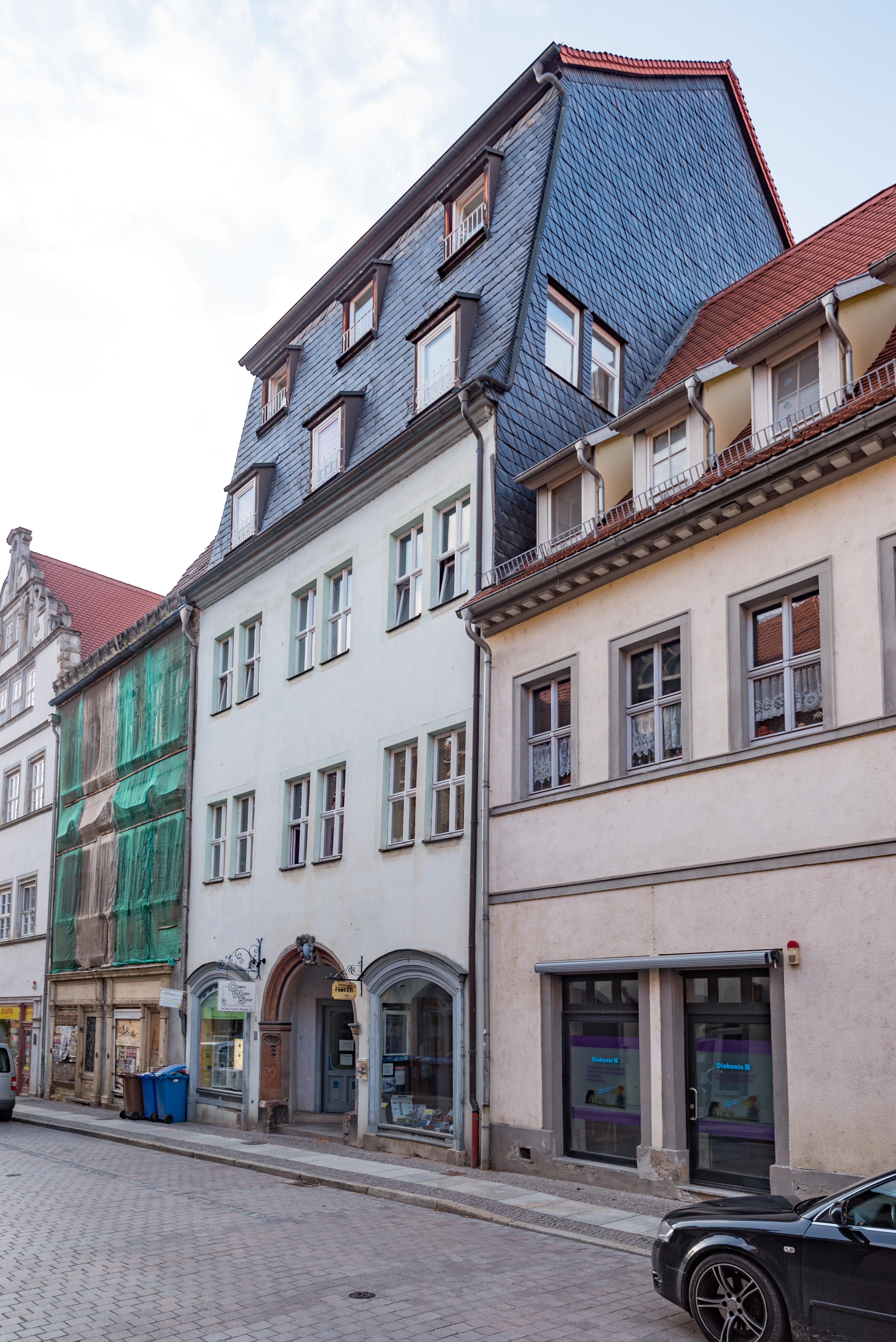 Naumburg (Saale), Marienstraße 37